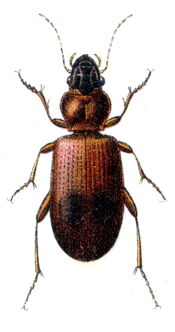 Trechus discus Fbr. = Blemus discus (Fabricius, 1792)